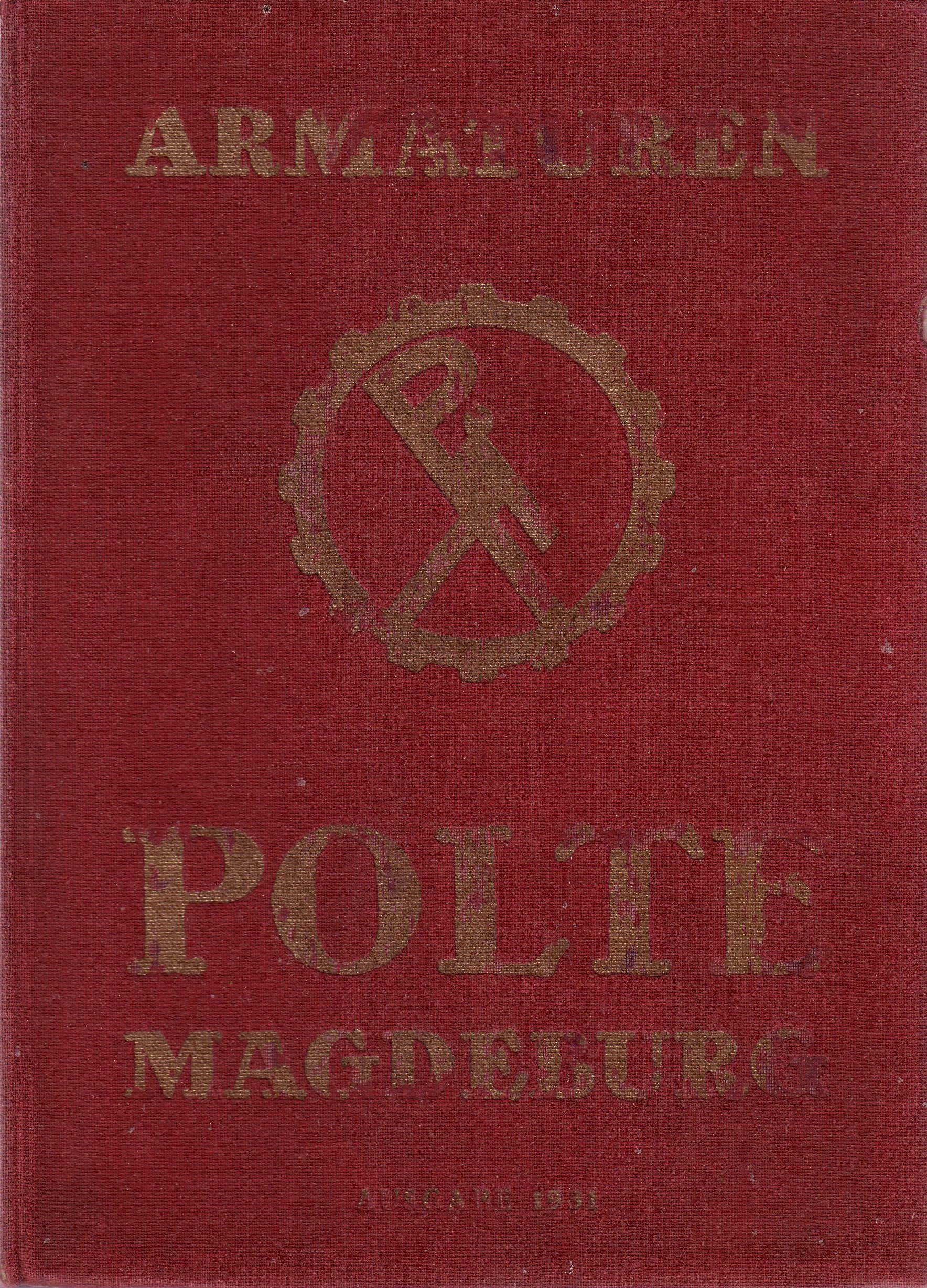 Katalog (Armaturen) der Polte-Werke, Magdeburg